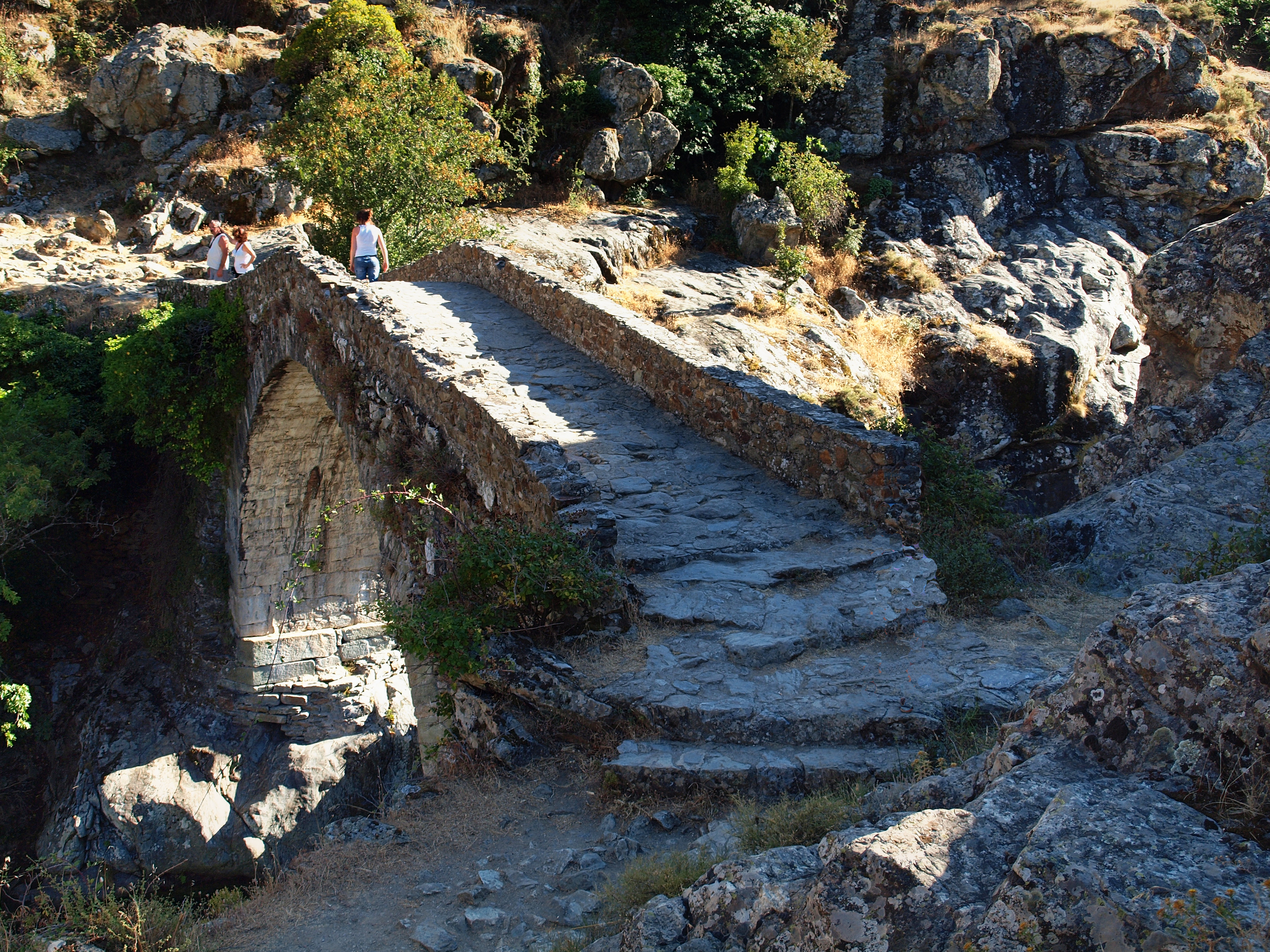 Asco (Corsica) - Pont génois sur la rivière Asco